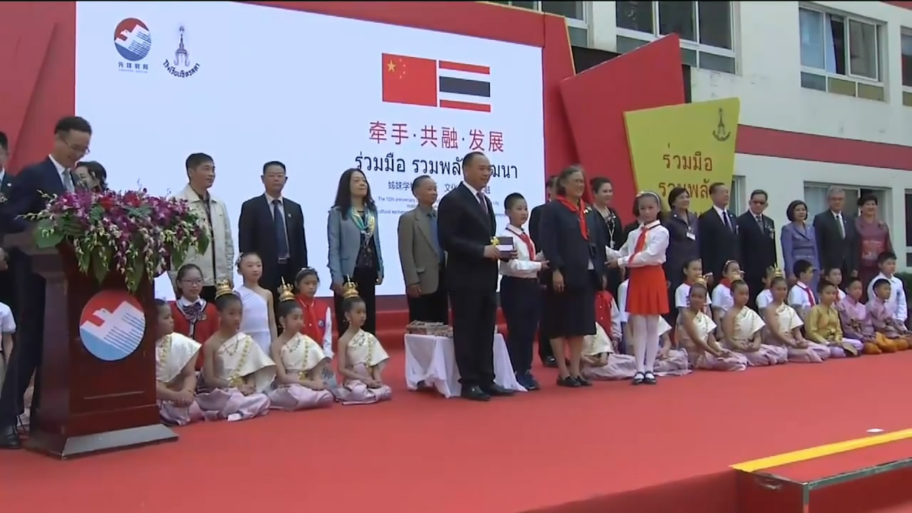 诗琳通公主访问绵阳市先锋路小学，2018年4月7日。